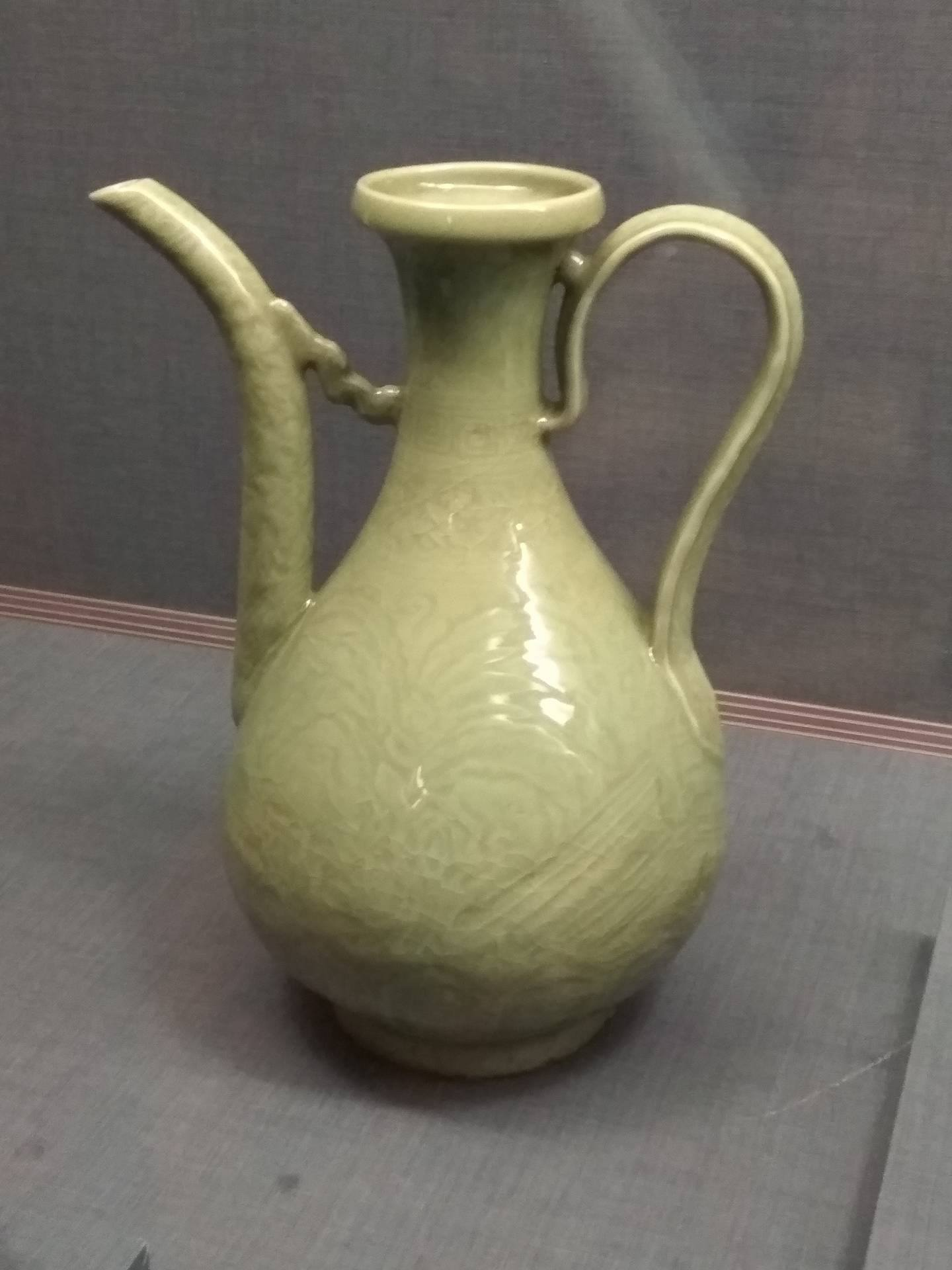 劃花芭蕉湖石執壺